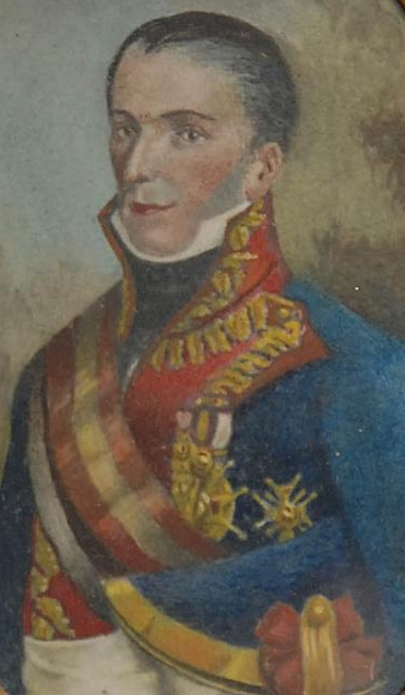 Brigadier General Joaquín de Soria